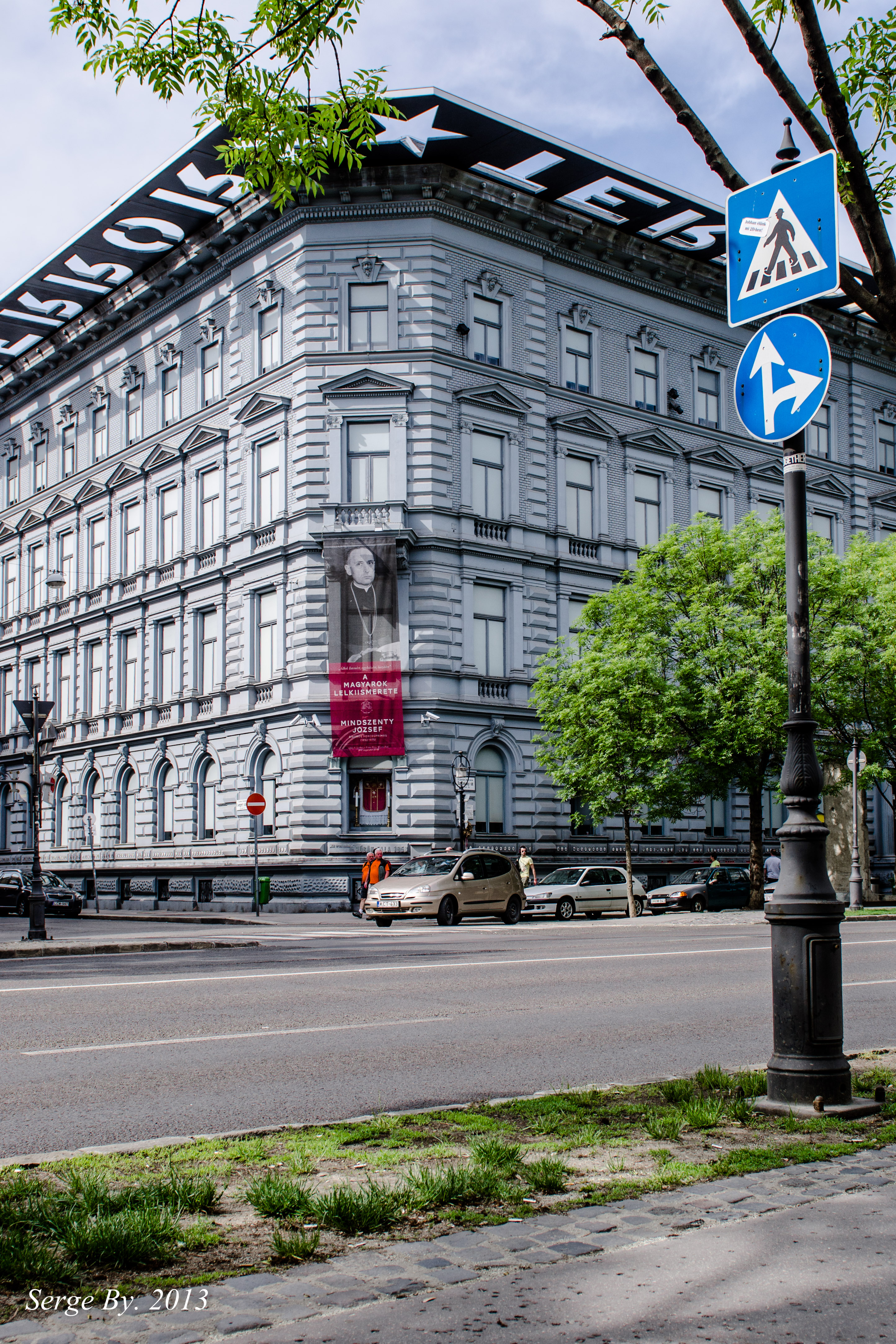 BSS_4650